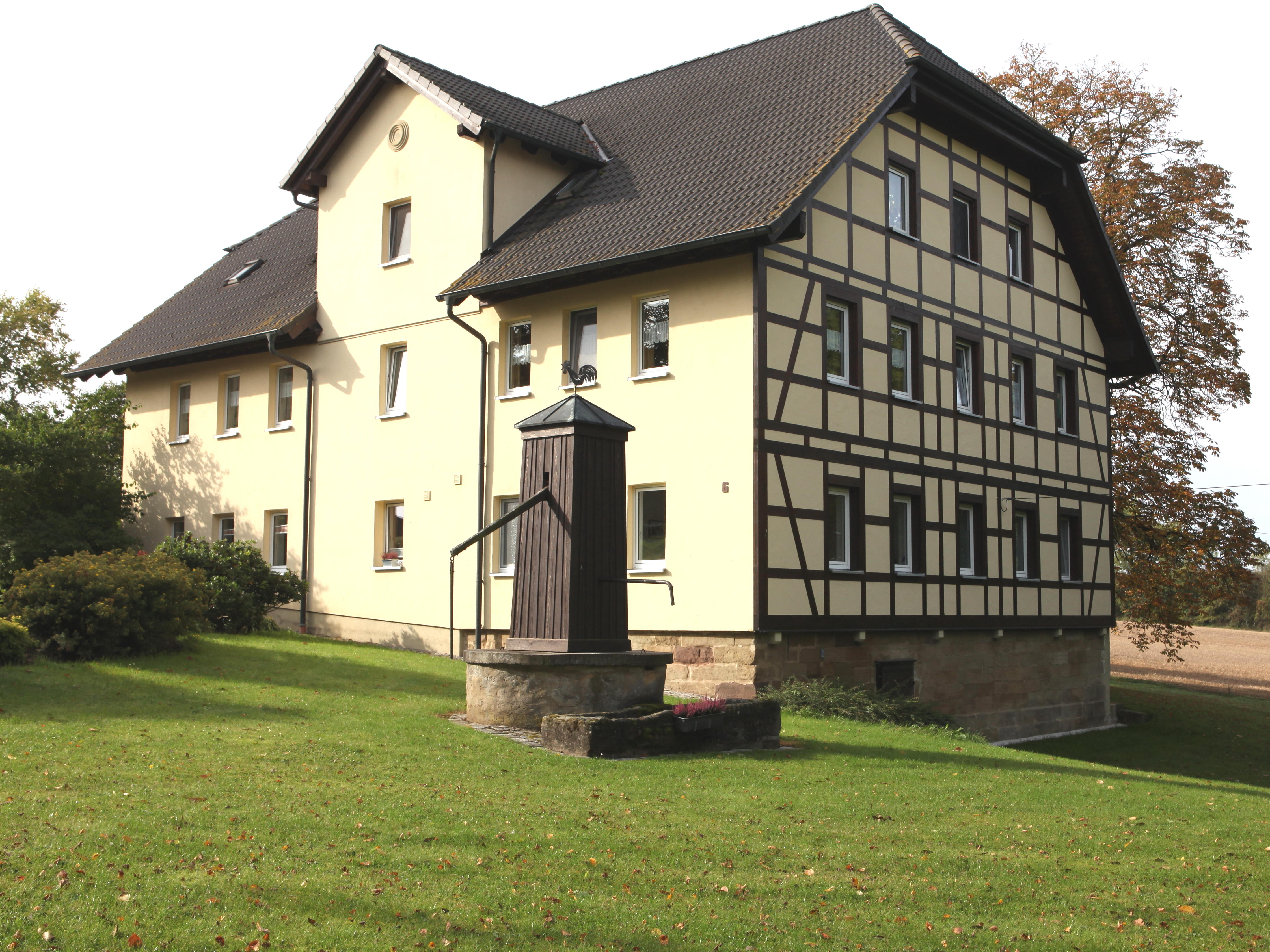 Breitenau-Rittergut